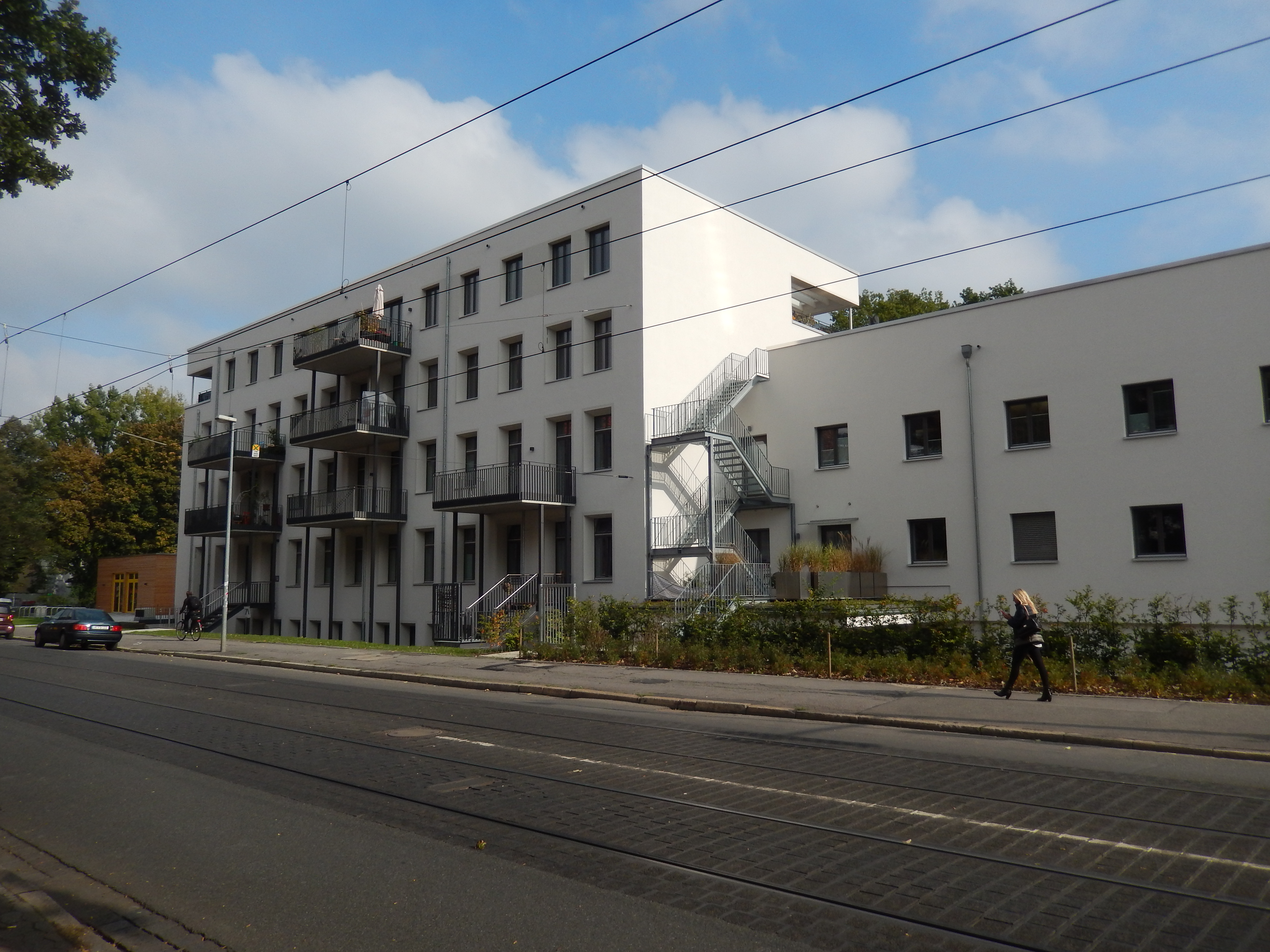 Ricklinger Straße 7A und 5C in Hannover (ehemalige Hautklinik, jetzt Wohnungen)